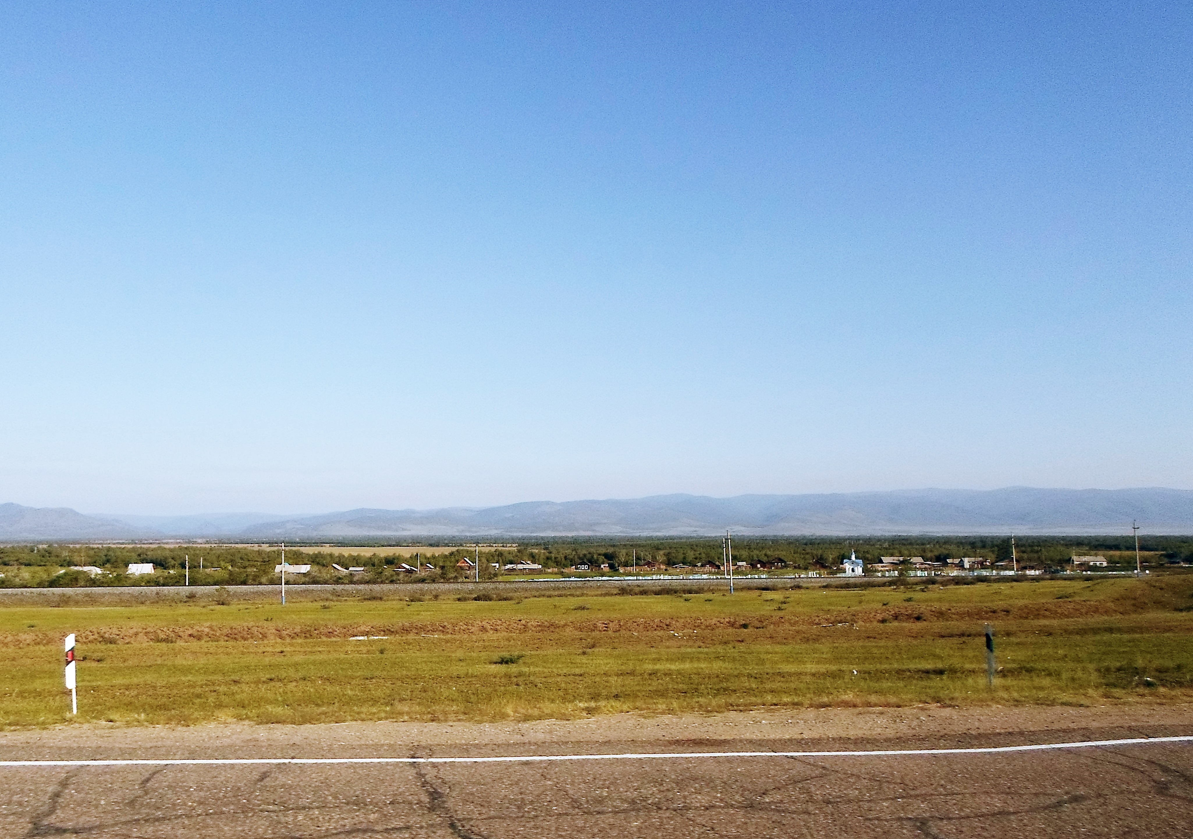 Село Нижний Убукун. Селенгинский район Бурятии. Вид с Кяхтинского тракта.